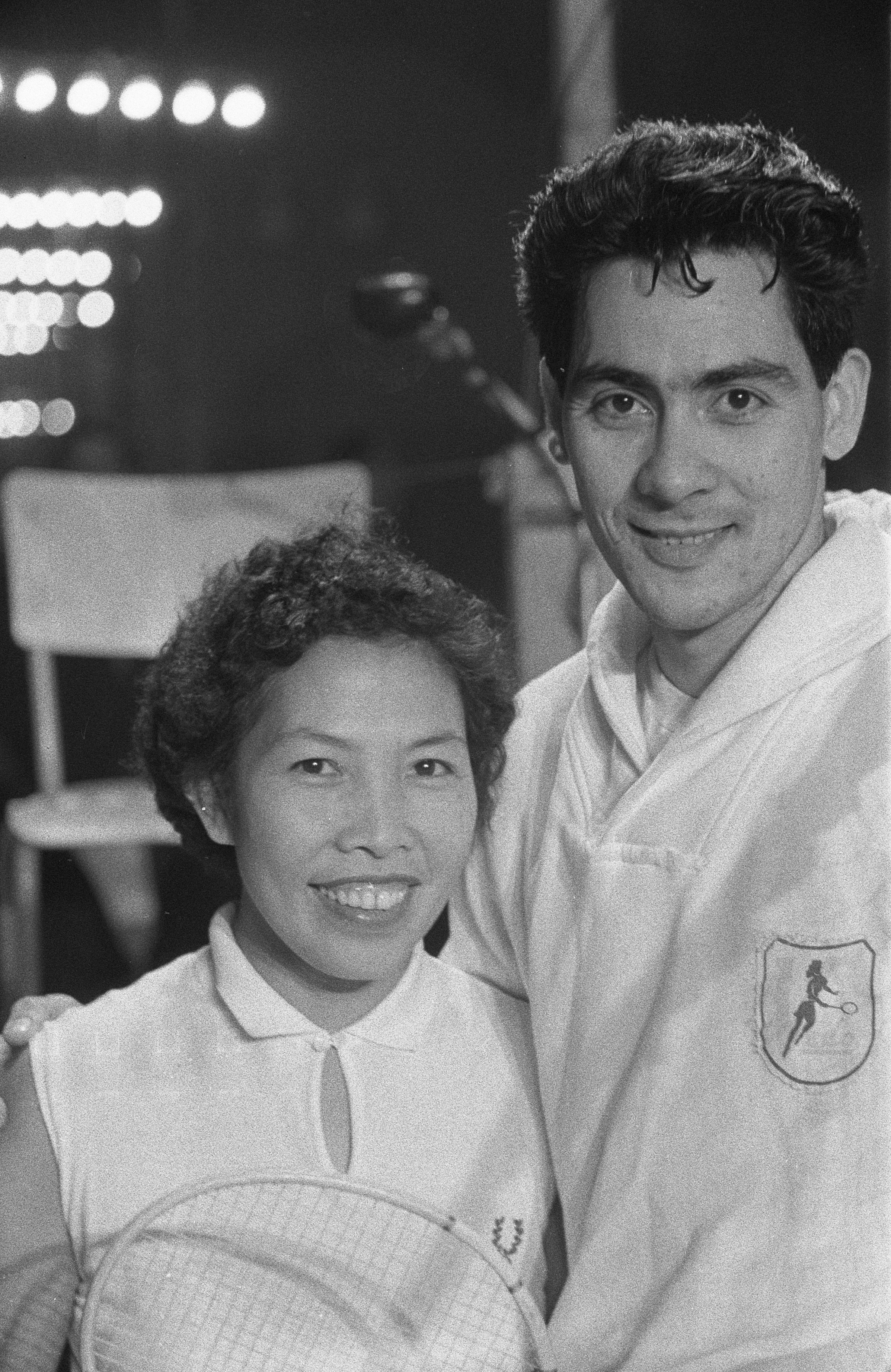 Collectie / Archief : Fotocollectie Anefo Reportage / Serie : Nederlandse kampioenschappen badminton in het Krelagehuis in Haarlem Beschrijving : Mevrouw Robbe en W.A. Seth Paul feliciteren elkaar Annotatie : W.A. Seth Paul is ook bekend als Pim Seth Paul Datum : 11 december 1960 Locatie : Haarlem, Noord-Holland Trefwoorden : badminton, kampioenschappen Persoonsnaam : Seth Paul, Pim Instellingsnaam : Krelagehuis Fotograaf : Harry Pot / Anefo Auteursrechthebbende : Nationaal Archief Materiaalsoort : Negatief (zwart/wit) Nummer archiefinventaris : bekijk toegang 2.24.01.05 Bestanddeelnummer : 911-8673